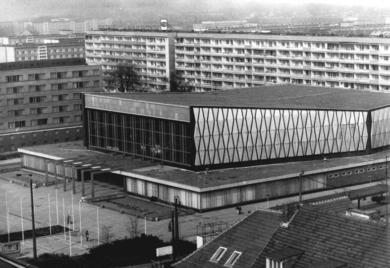 Cottbus, Stadthalle ADN-ZB Weißflog 5.6.87-pr-Cottbus: Das im zweiten Weltkrieg zu 60 Prozent zerstörte Cottbus wurde in den Jahren nach 1949 neu aufgebaut, umfassend rekonstruiert und modernisiert. So entstanden ca. 44.000 Wohnungen für die fast 127.000 Einwohner zählende Bezirksstadt. Unser Foto (1987) zeigt die Stadthalle in Cottbus und innerstädtische Neubauten